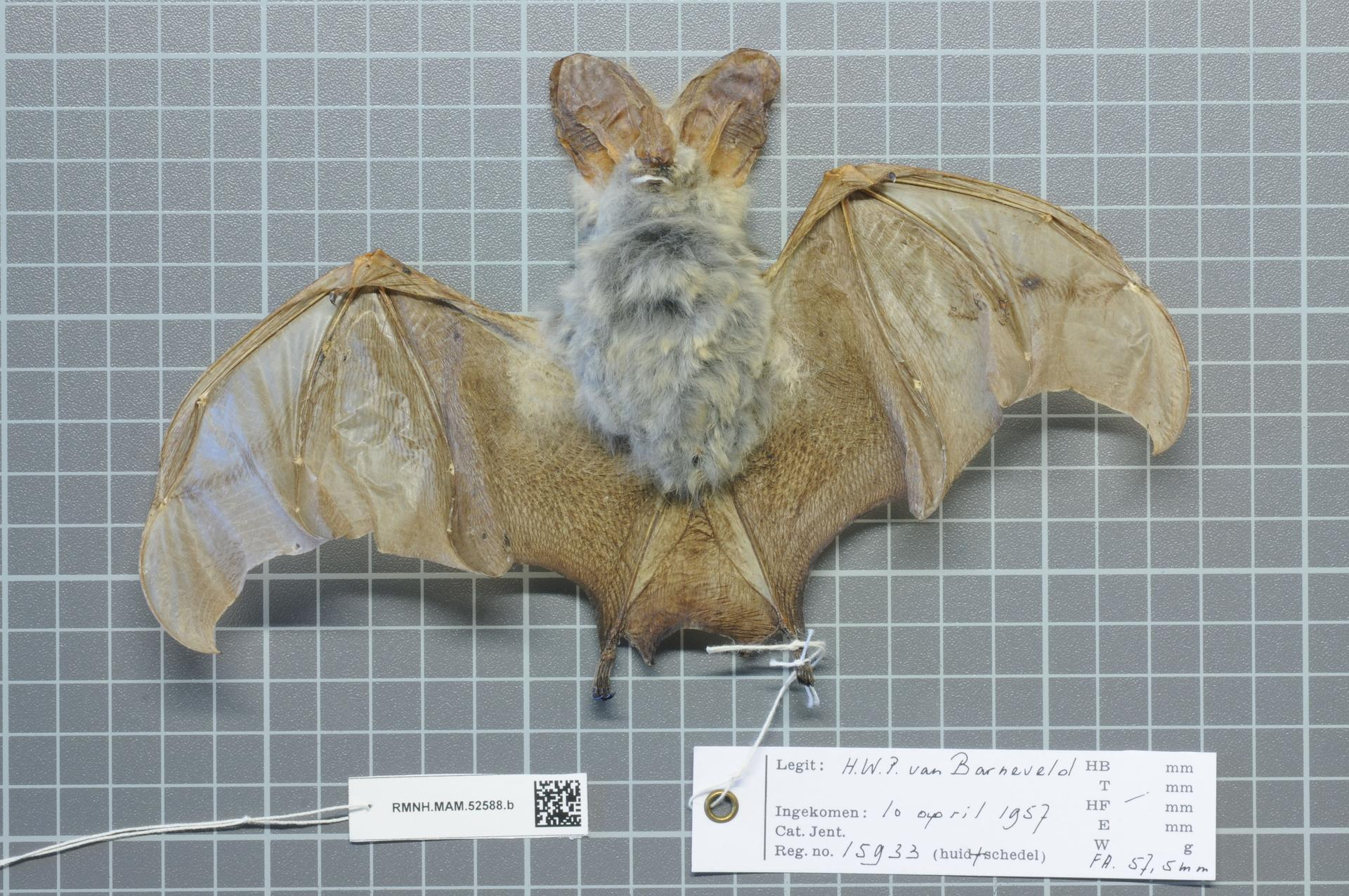 Lavia frons